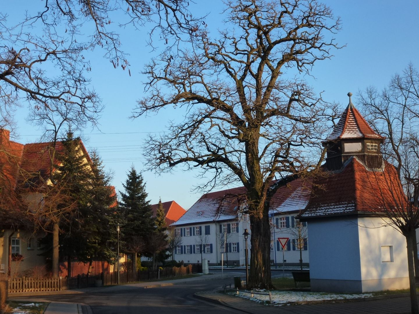 Transformatorenhaus mit barockem Dachaufsatz